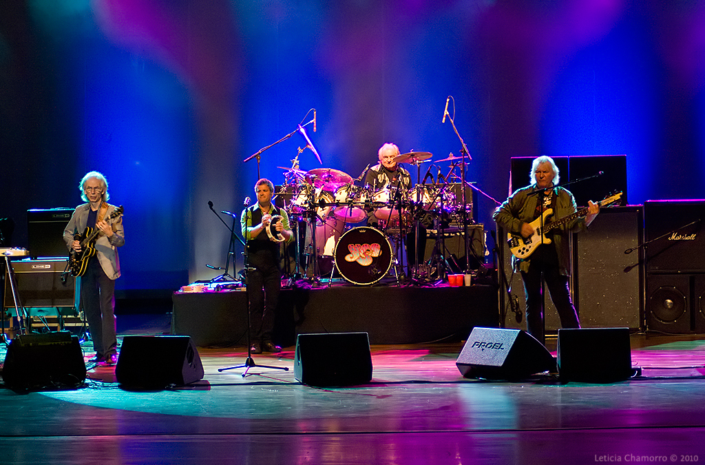 Yes concert at Gran Teatro del Banco Central del Paraguay, Asunción, Paraguay